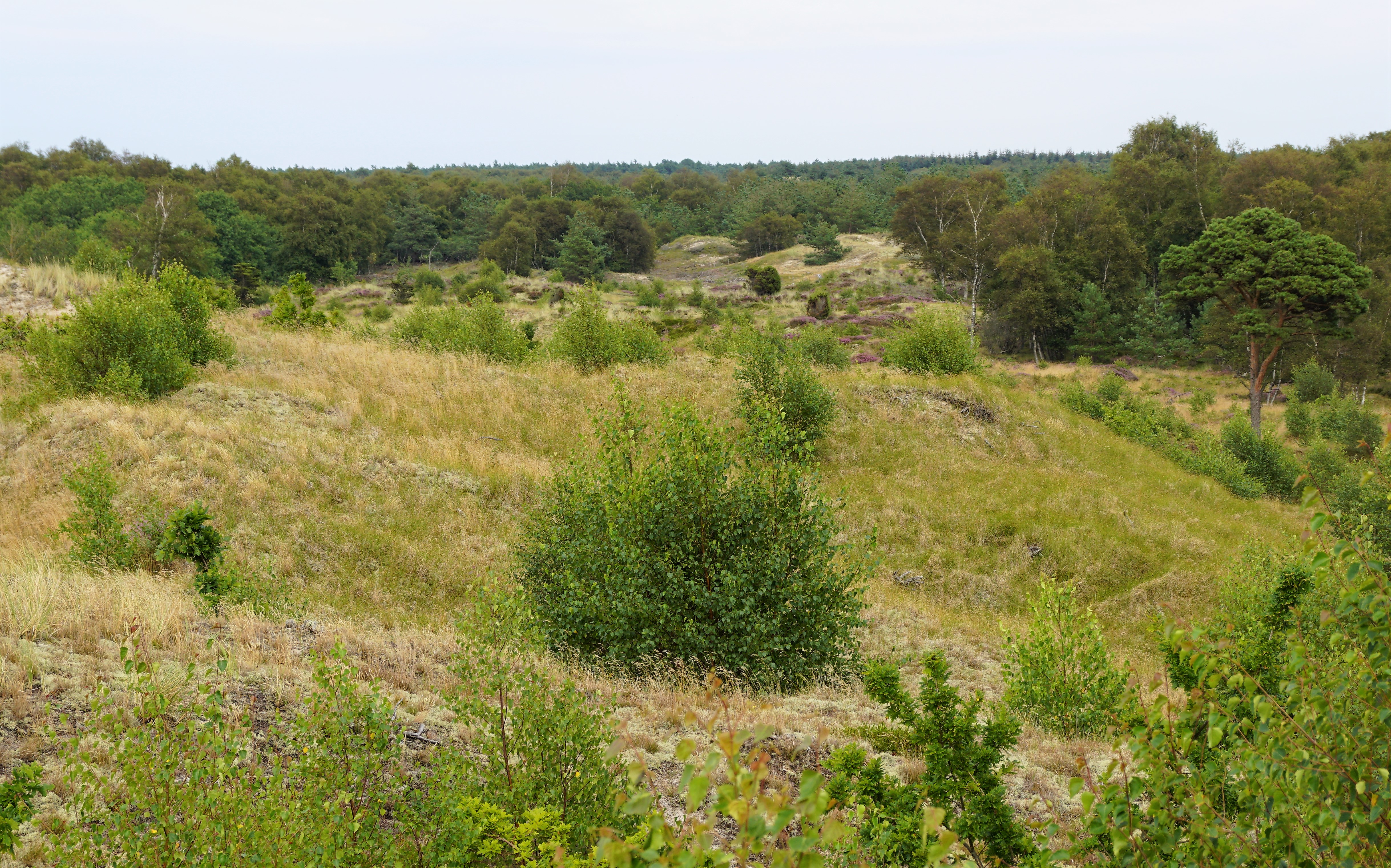 Højsande set mod sydøst